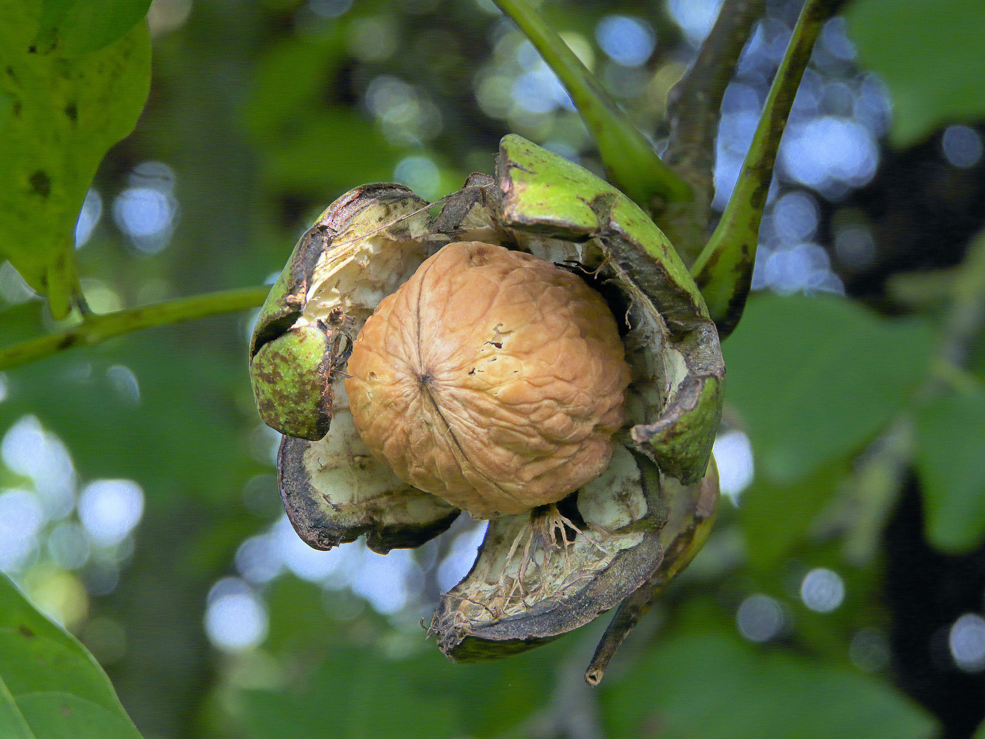 Juglans regia, rijpe walnoot 'Buccaneer'